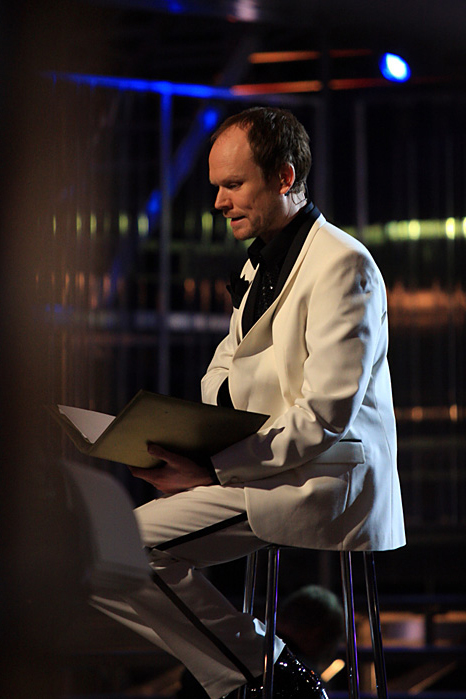 Generalrepitionen för melodifestivalen 2008